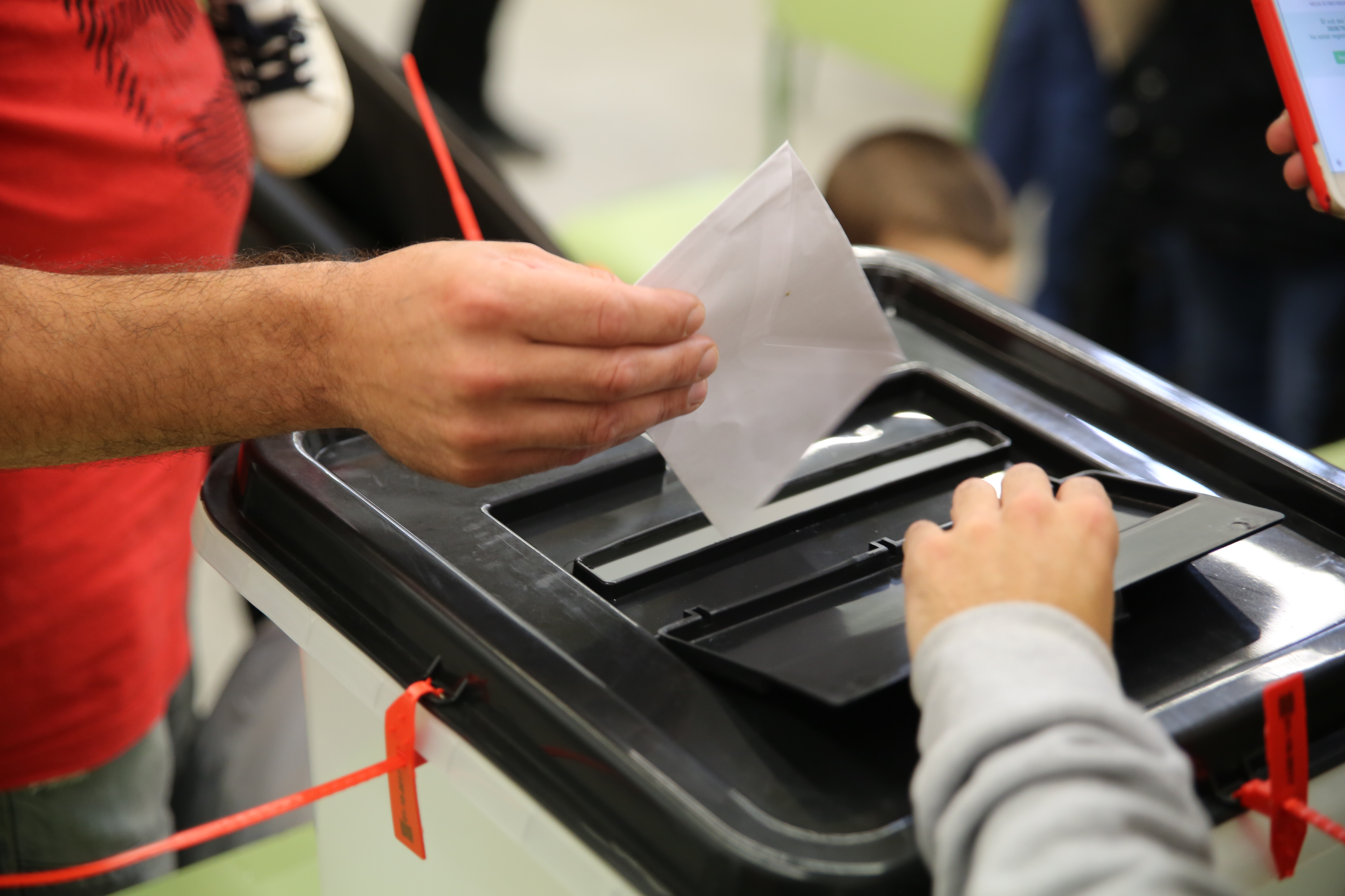 Referendum de independencia de Cataluña del 1 de octubre de 2017 Wikipedia: Catalan independence referendum, 2017 See alsocategory: Catalan independence referendum, 2017.